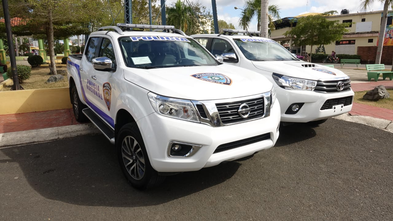 Camionetas